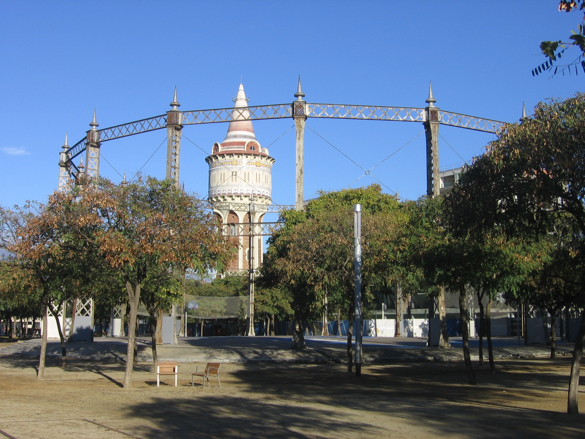 Parque de la Barceloneta.